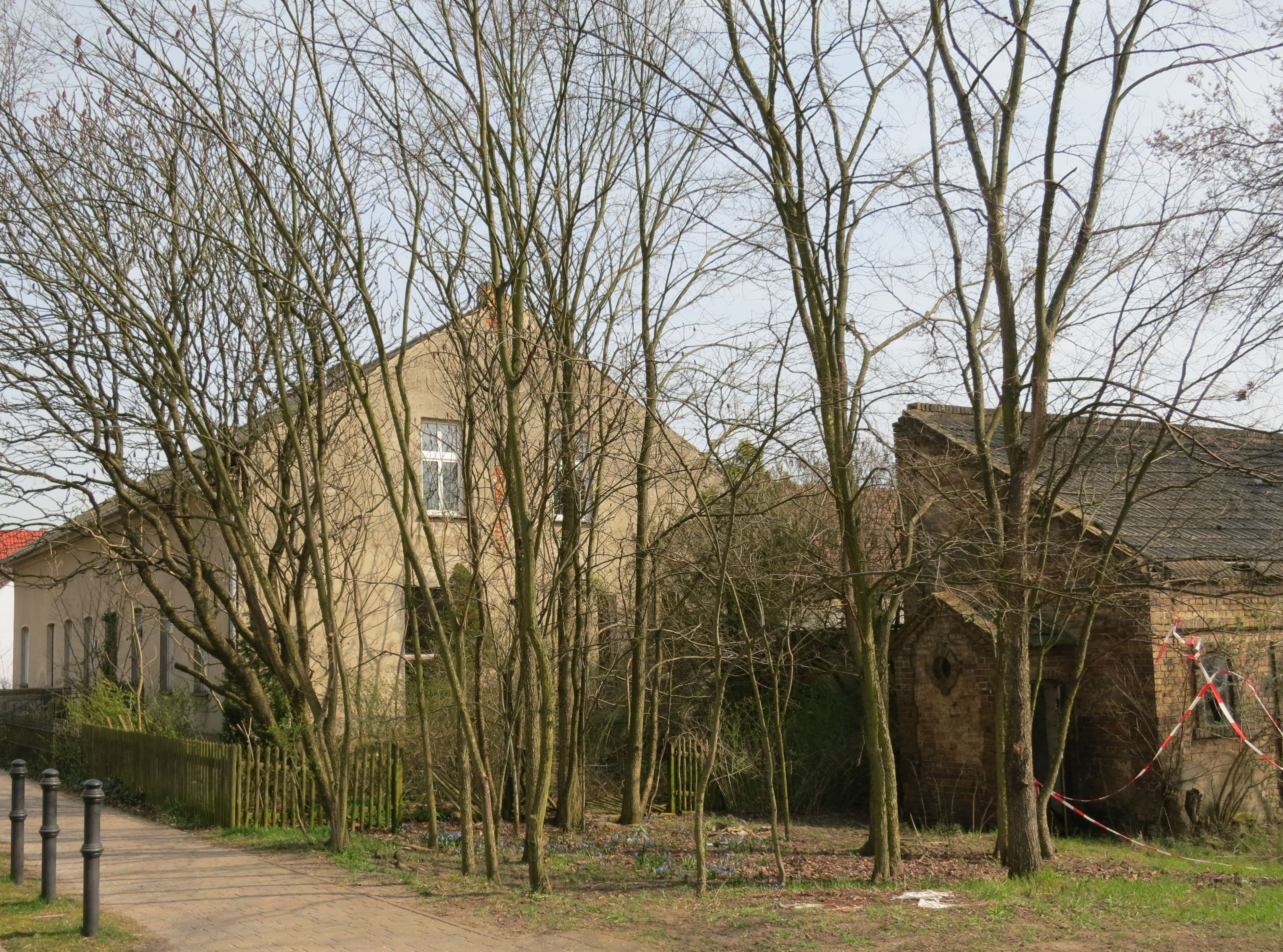 Hof Diedersdorf, Dorfstr 23, denkmalgeschützt. Blick von Nordwesten auf Wohnhaus und einen Stall.